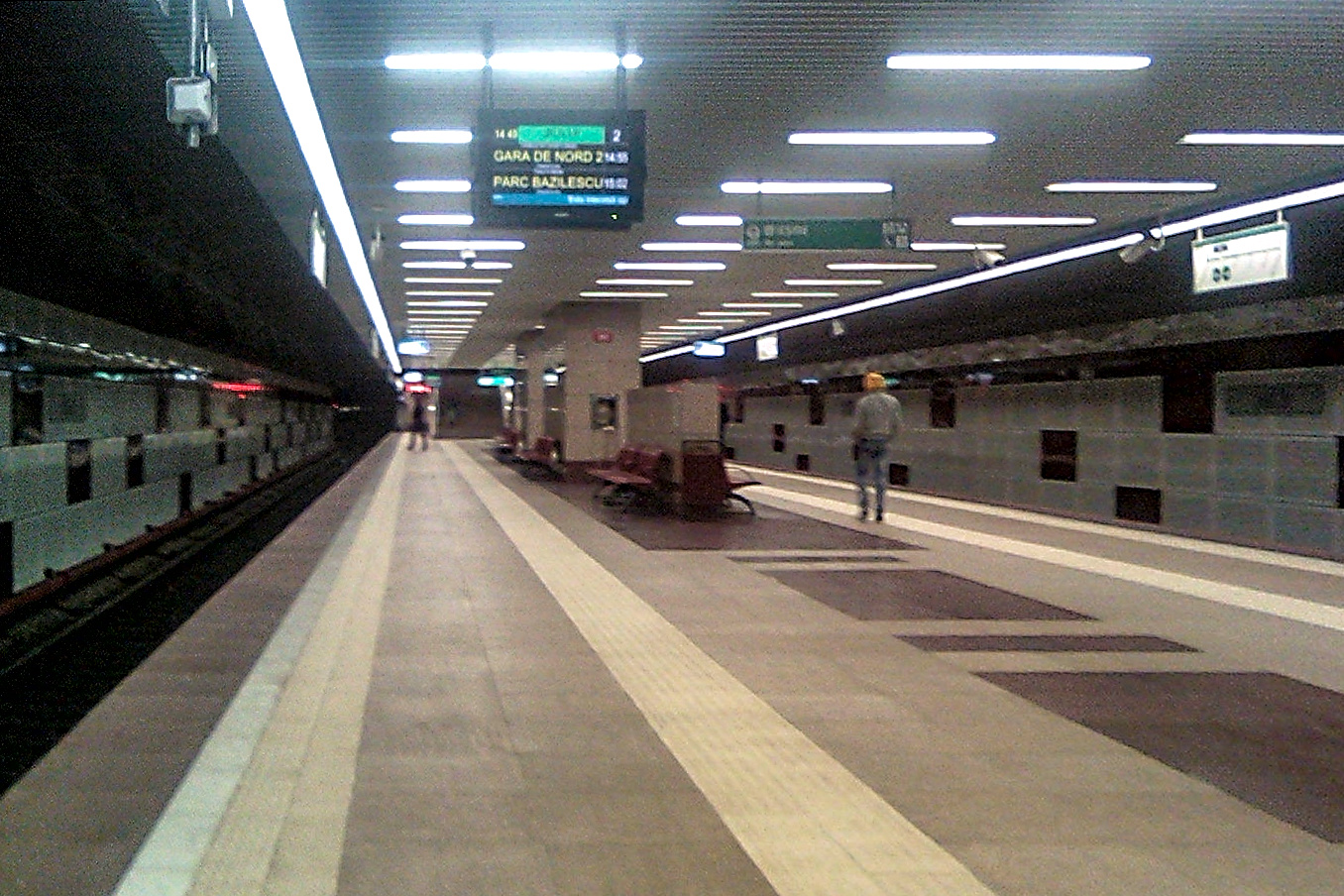 Stația de metrou Jiului din București.